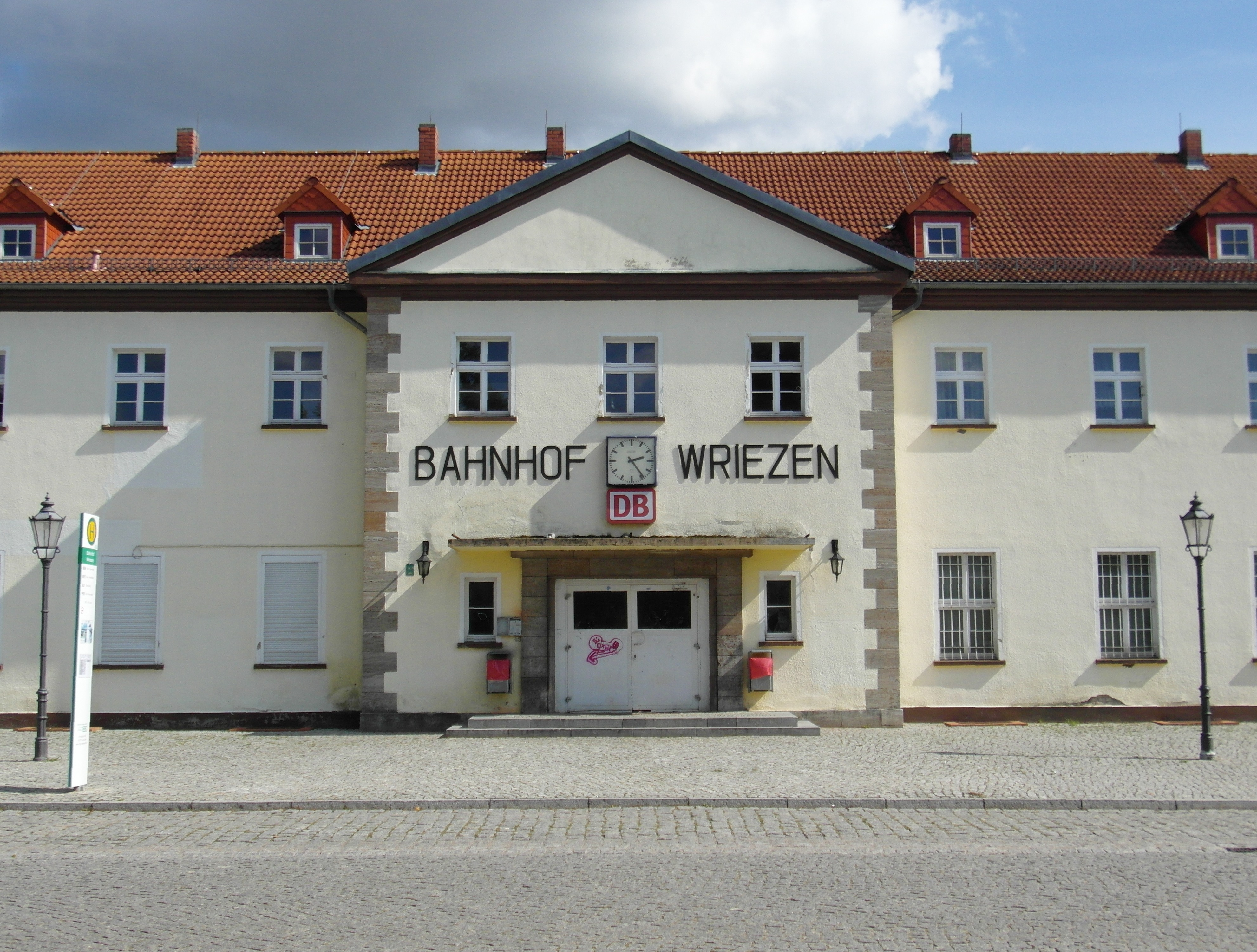 Linie OE 60